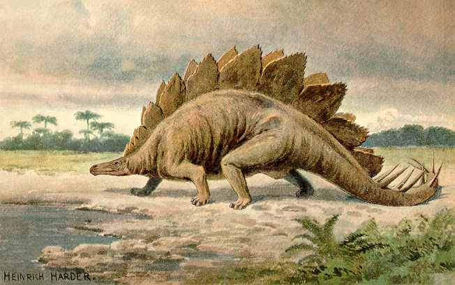 Stegosaurus